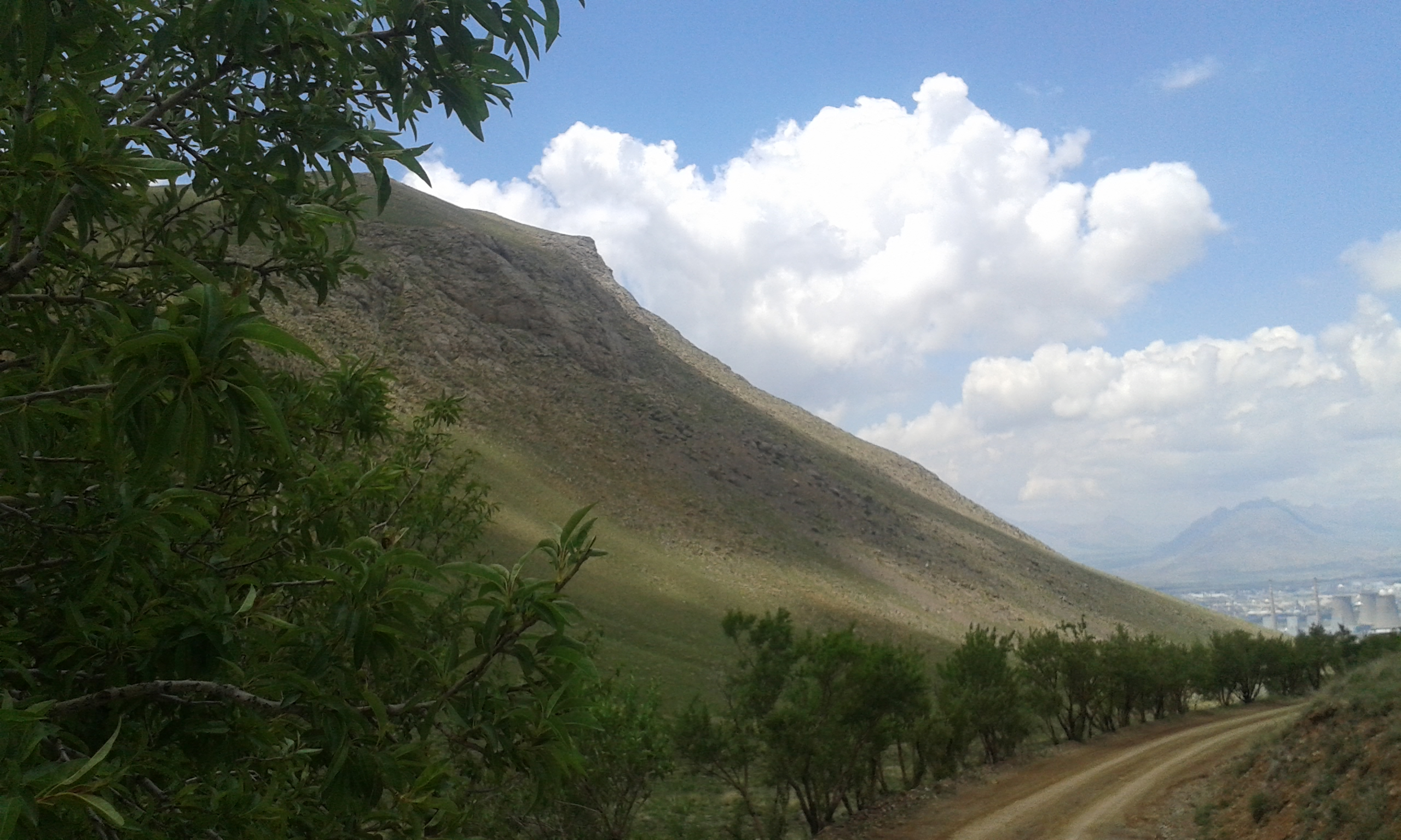 شهرستان اراک - نمایی از نیروگاه شازند